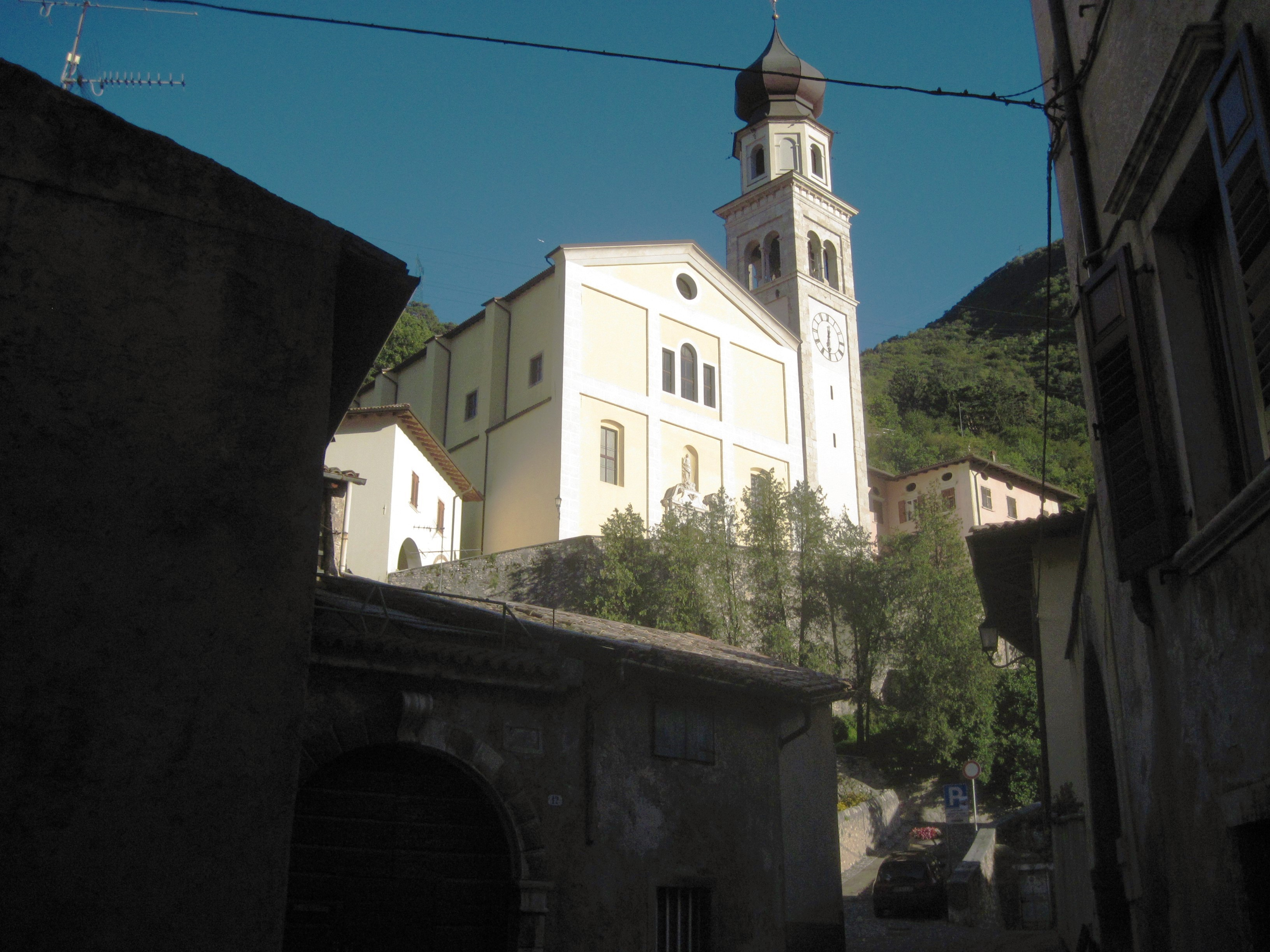 Vista della chiesa dalla parte est del paese di Ala